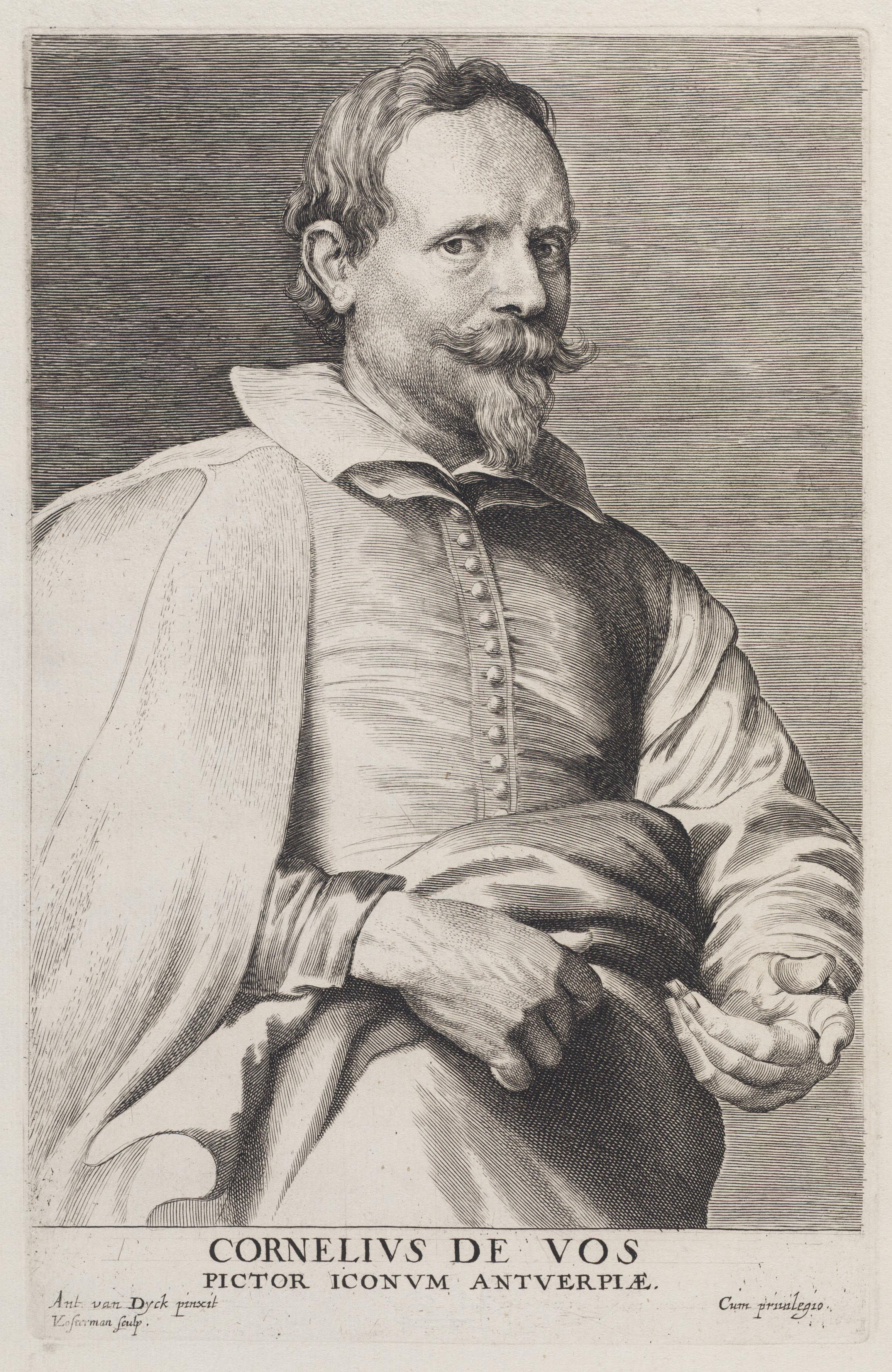 Portrait of Cornelis de Vos (1584-1651)